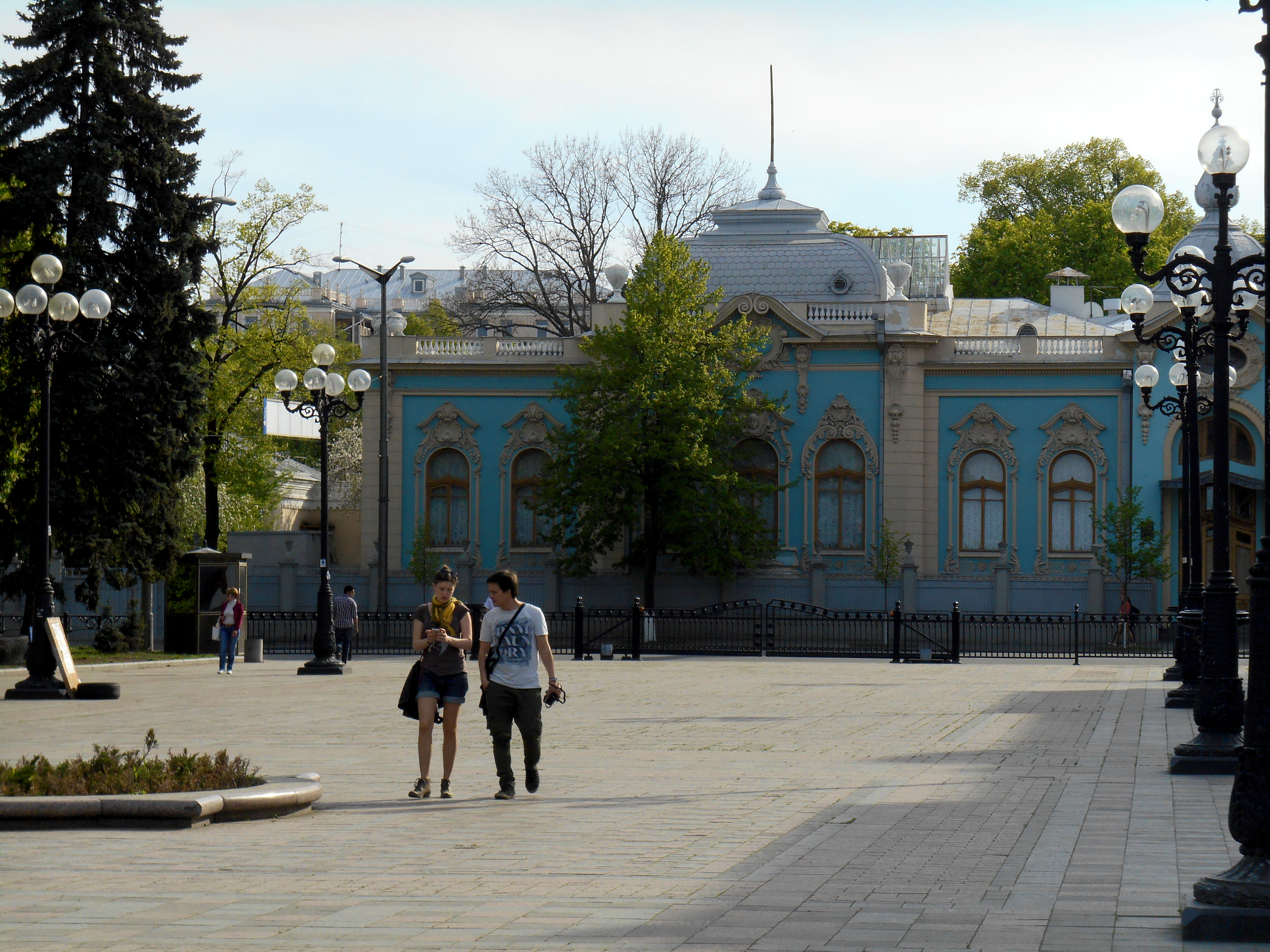 Особняк (Я. Л. Полякова), в якому у 1934–1937 роках жив П. П. Постишев, партійний та громадський діяч, Київ, Грушевського Михайла вул., 22